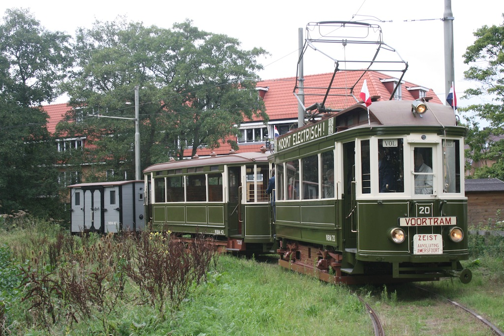 Tramstel NBM 20 + 43 + 402 op de Electrische Museumtramlijn Amsterdam te Bovenkerk; 21 september 2012. Foto: Erik Swierstra.